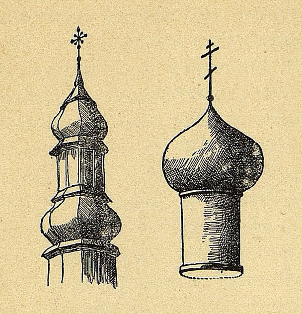 Беларуская (тарашкевіца): Купал-баня з 4-канцовым грэцкім крыжам, уласьцівая царкоўнай архітэктуры Вялікага Княства Літоўкага (беларускае народнае дойлідзтва), і купал-цыбуліна з 8-канцовым маскоўскім крыжам, уласьцівая царкоўнай архітэктуры Маскоўскай дзяржавы (расейскае народнае дойлідзтва). Малюнак з зборніка Віцебскай навуковай археалягічнай камісіі, 1911 год.